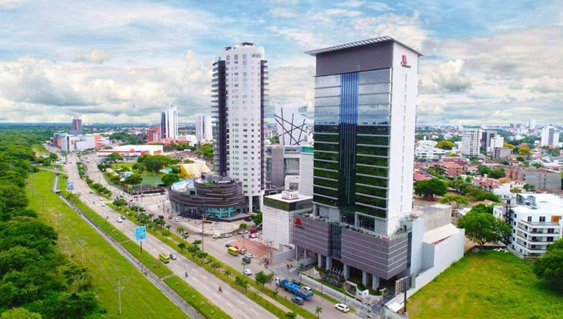 Equipetrol